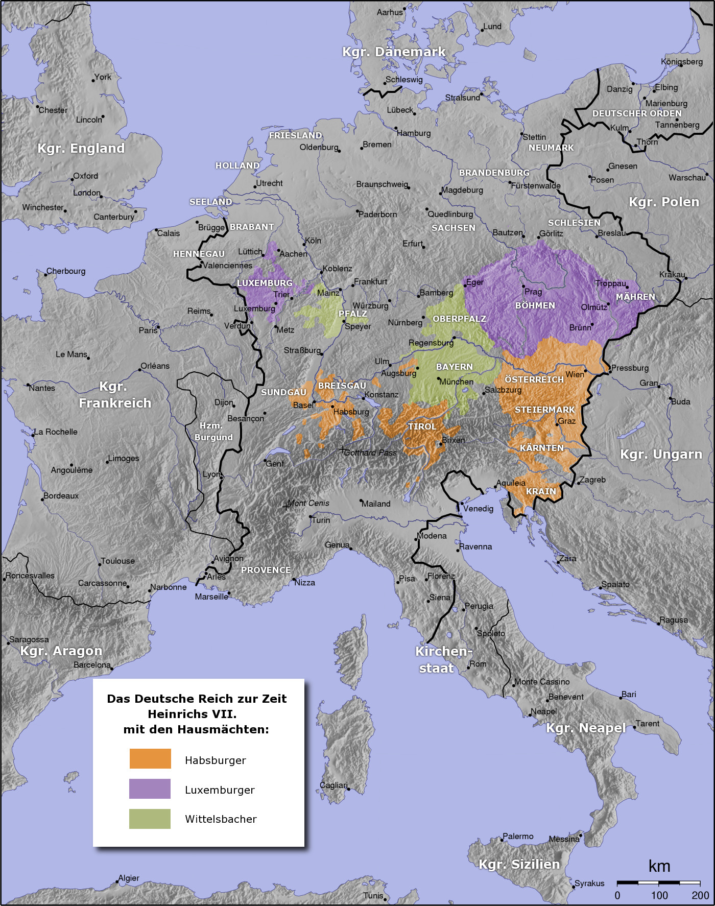 Heiliges Römisches Reich zur Zeit Heinrichs VII.